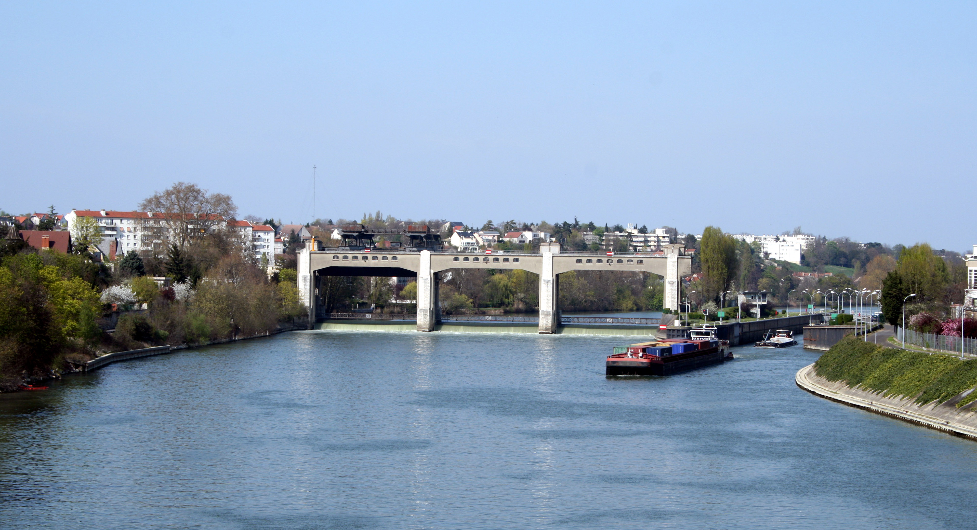 Ecluse de Chatou